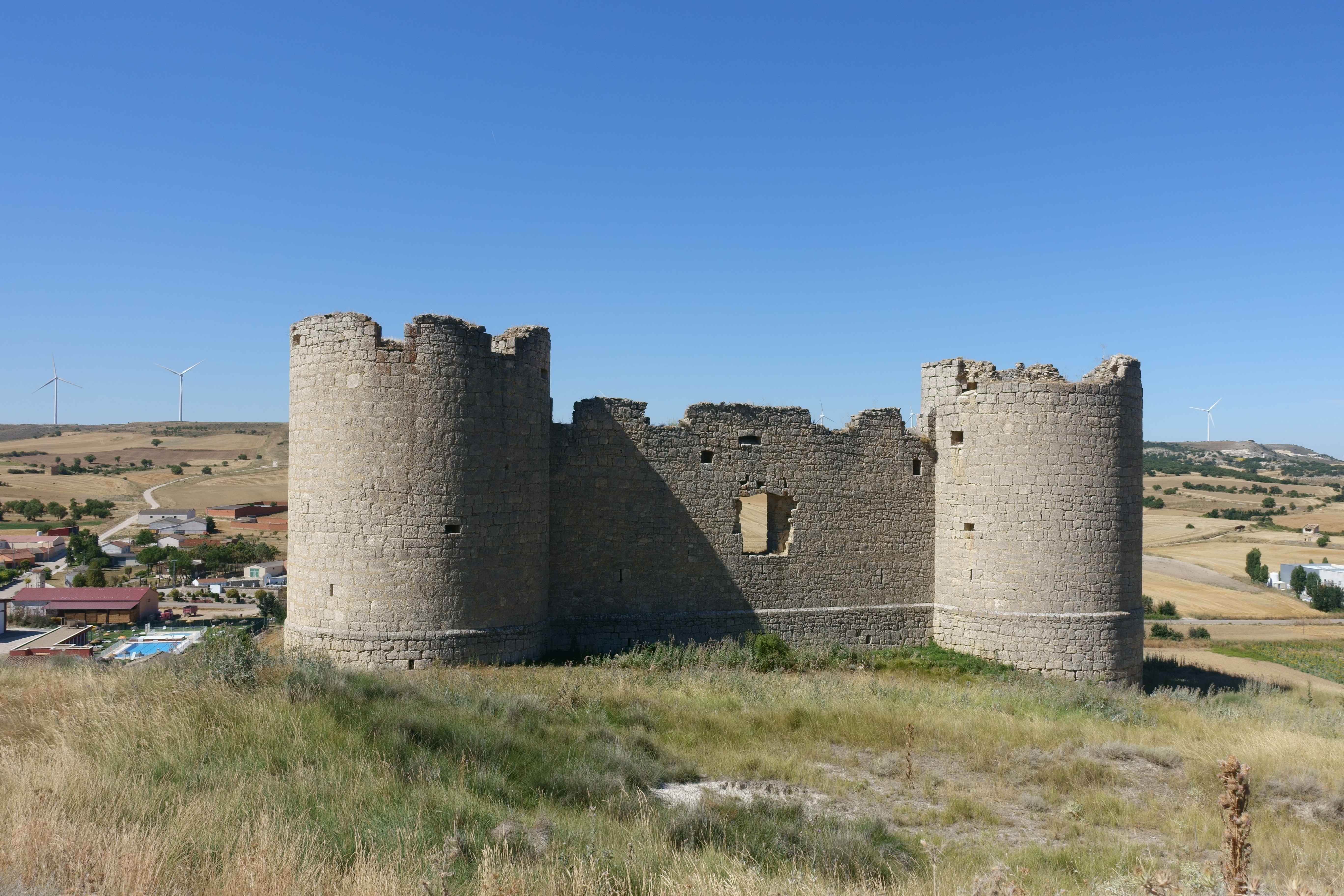 Castillo de Hornillos de Cerrato (Palencia, España).